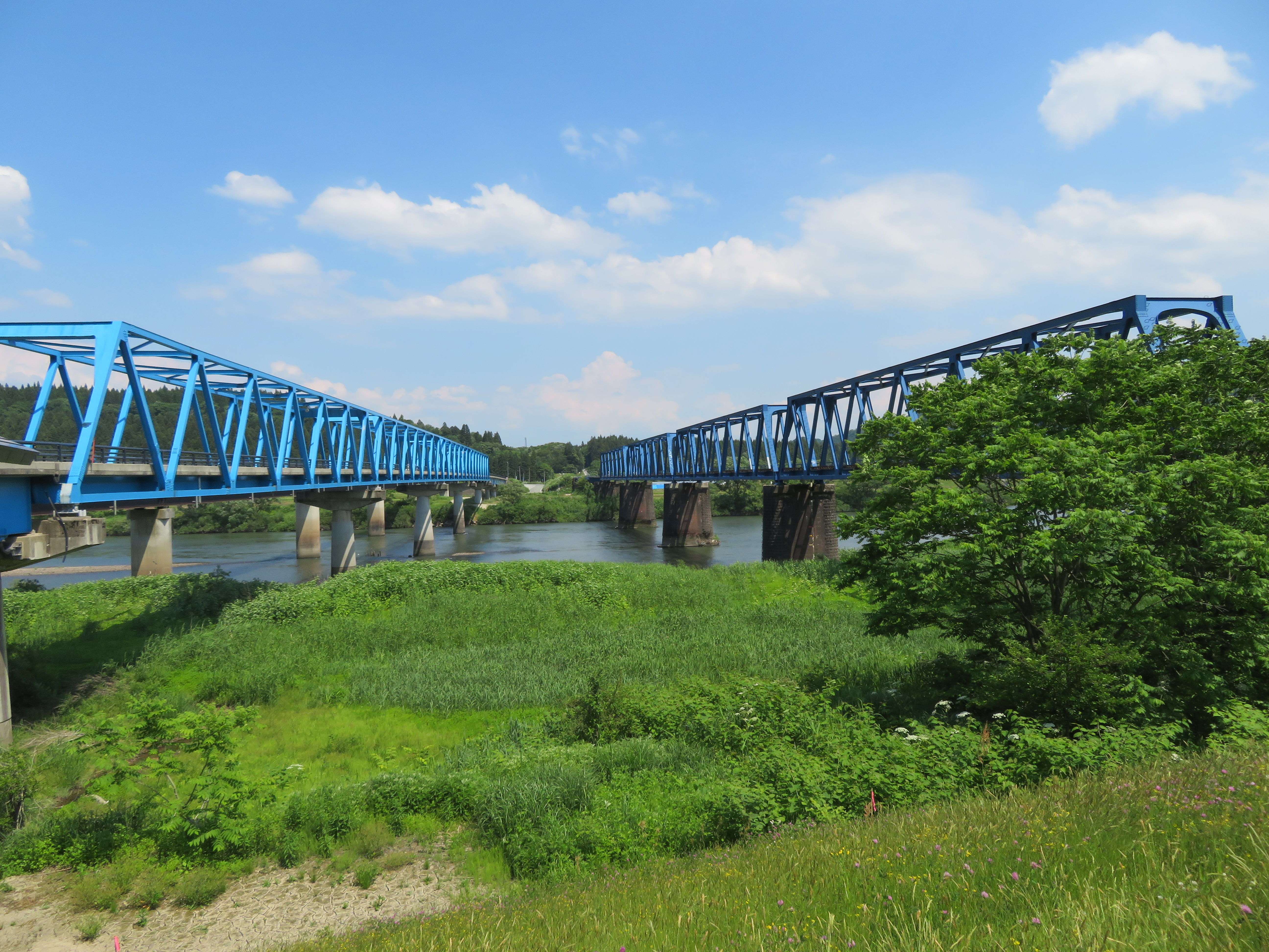 ＪＲ陸羽西線 第一最上川橋梁と山形県道34号線 最上川に架かる古口大橋（左岸側から撮影）